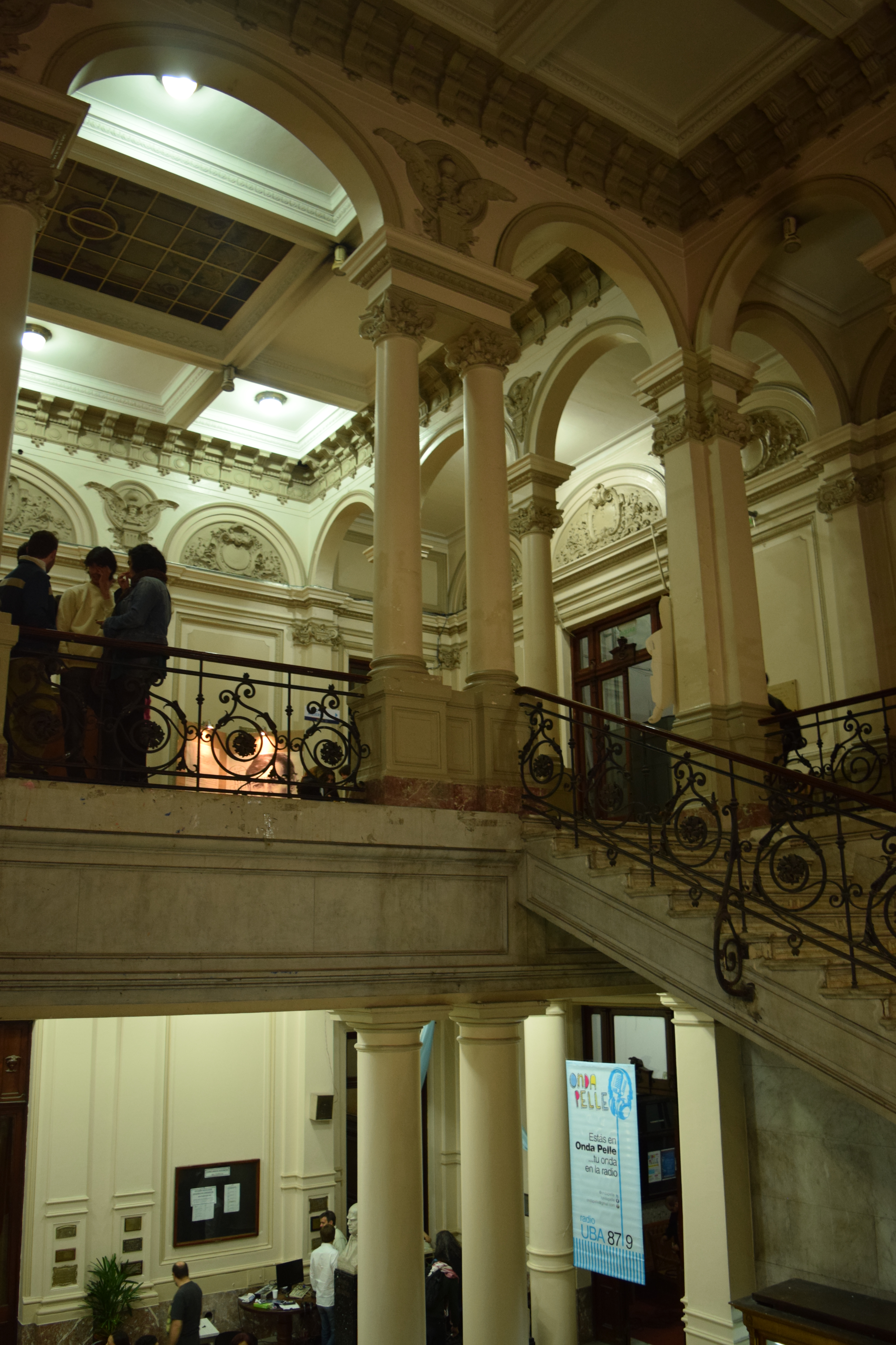 La Escuela Superior de Comercio Carlos Pellegrini dependiente de la Universidad de Buenos Aires.